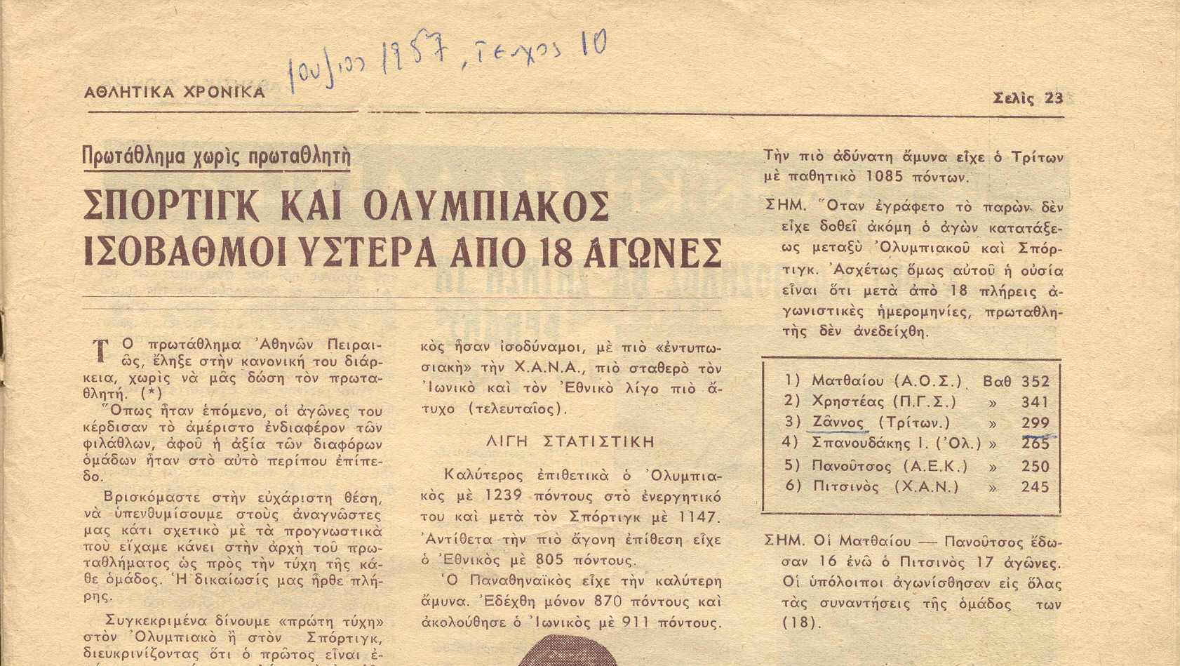 Δημοσίευμα Ιούλιος 1957